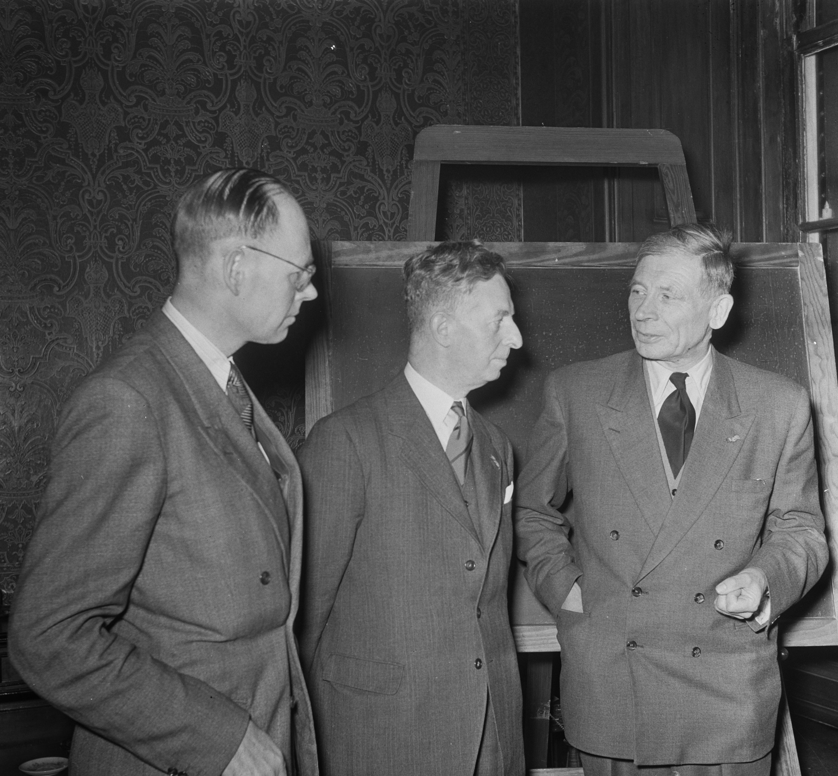 Collectie / Archief : Fotocollectie Anefo Reportage / Serie : [ onbekend ] Beschrijving : Installatie Deltacommissie. Vlnr voorzitter A.G. Maris, minister Alegra en professor Thijsse Datum : 21 februari 1953 Trefwoorden : commissies, ministers, voorzitters, waterstaat Persoonsnaam : Algera, Jacob, Maris, A.G., Thijsse, J.T. Fotograaf : Noske, J.D. / Anefo Auteursrechthebbende : Nationaal Archief Materiaalsoort : Negatief (zwart/wit) Nummer archiefinventaris : bekijk toegang 2.24.01.03 Bestanddeelnummer : 905-5645